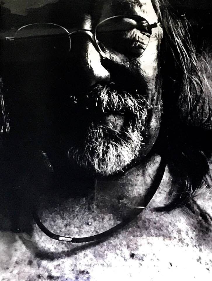 Selbstportrait